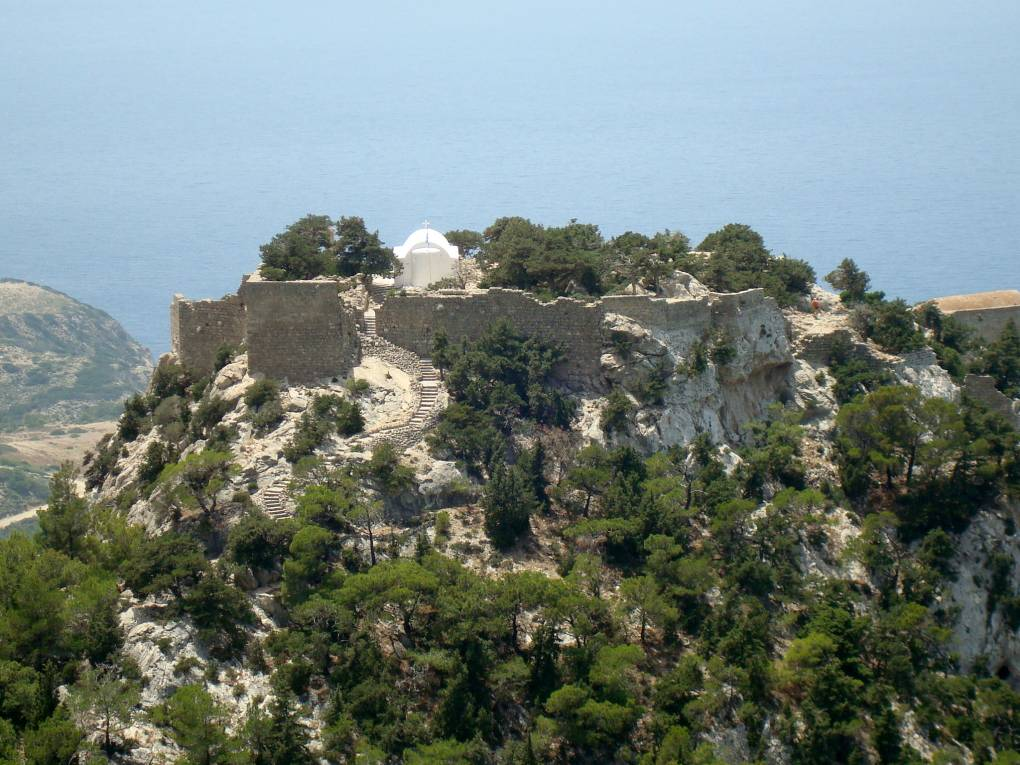 Forteresse de Monolithos sur l'île de Rhodes (Grèce)